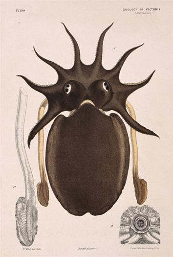 Sepia apama